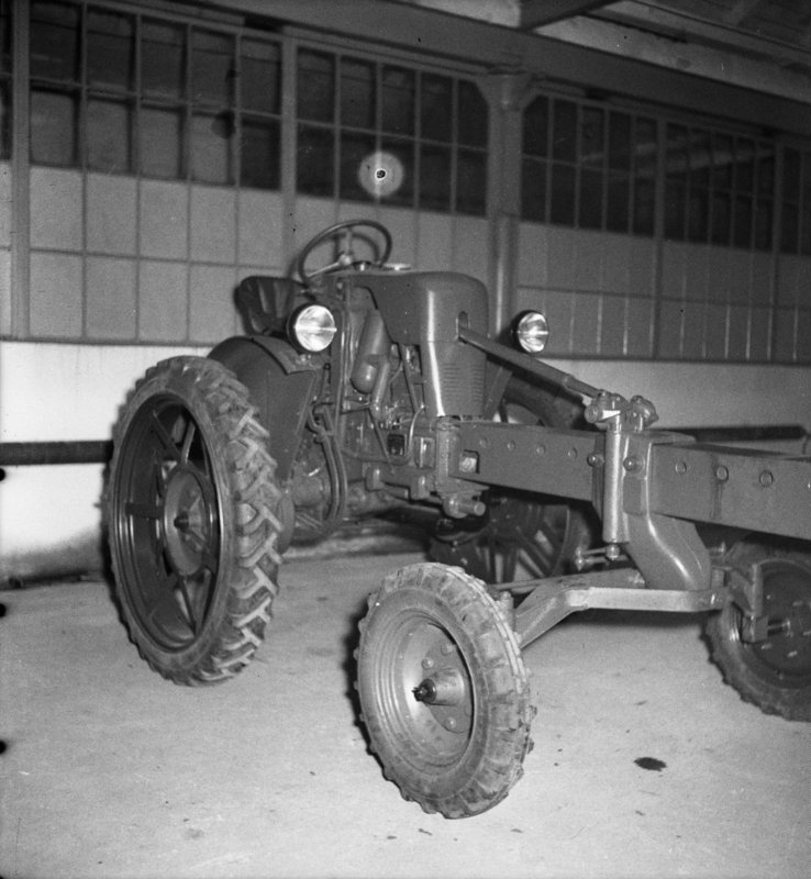 Zentralbild Rösener 19.1.1953 IFA Schleppwerk Schönebeck produziert mit vollen Rohren Landmaschinen für die Frühjahrsbestellung. Von großer Bedeutung für die Bearbeitung landwirtschaftlicher Großflächen ist der "Maulwurf-Geräteträger" der im IFA-Schlepperwerk Schönebeck (Kreis Magdeburg) hergestellt wird. Er kann wechelseitig mit Rübenhackgeräten, Grasmähbalken, Kartoffelpflegegeräten und Obstbaumspritzen gekoppelt werden. In der Montagehalle studieren 40 Traktoristen die Arbeitsweise des "Maulwurfen" und seiner Aufhängegeräte, um anschließend für acht Tage in den Traktoristenschulen der DDR ihr Wissen an die Kollegen weiterzugeben. UBz: Der "Maulwurf."